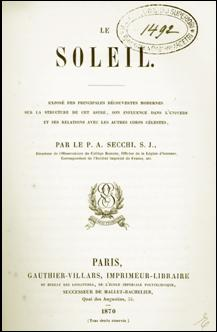 frontespizio libro antico